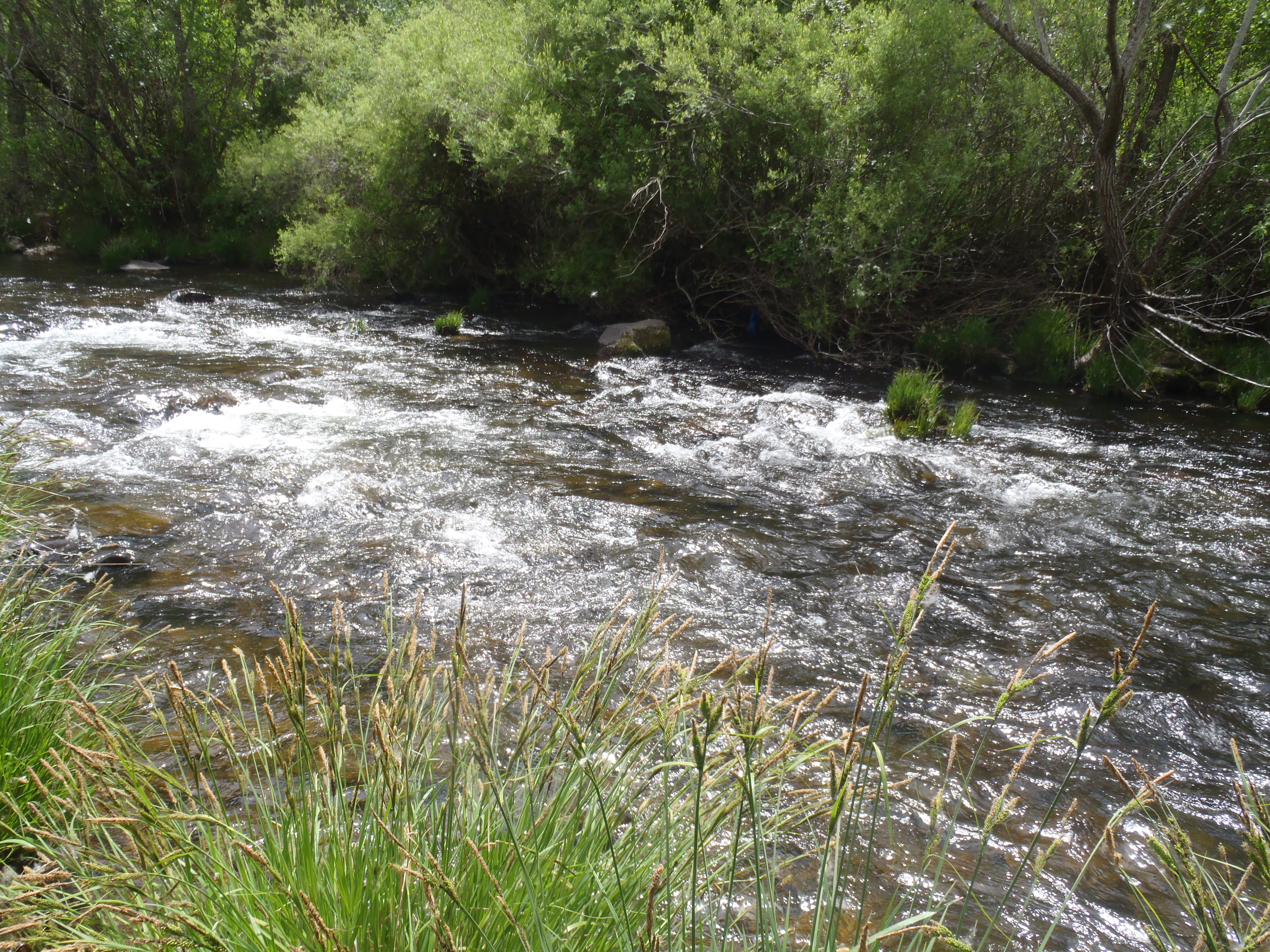 Rio Pedroso cerca de Barbadillo del Pez, cascajar a mediados de primavera